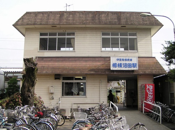 Sagami-Numata Station, on the Izuhakone Daiyūzan Line, Odawara, Kanagawa 相模沼田駅